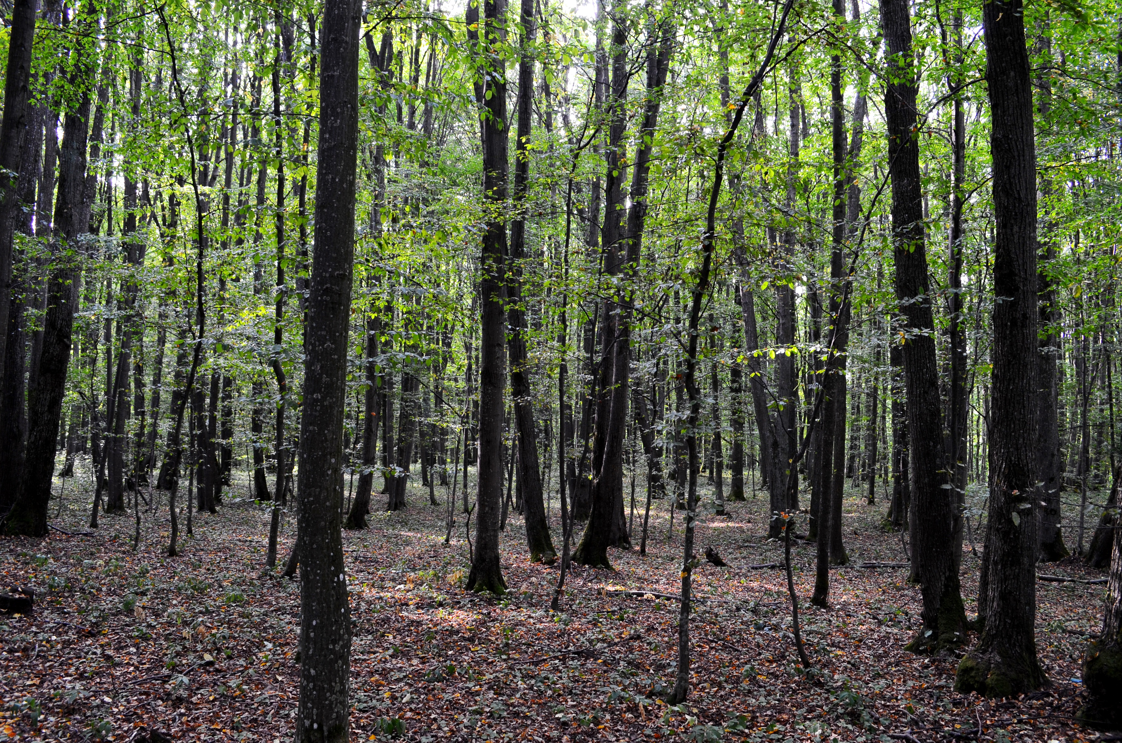 Virbalgirio giria, Vilkaviškio raj.